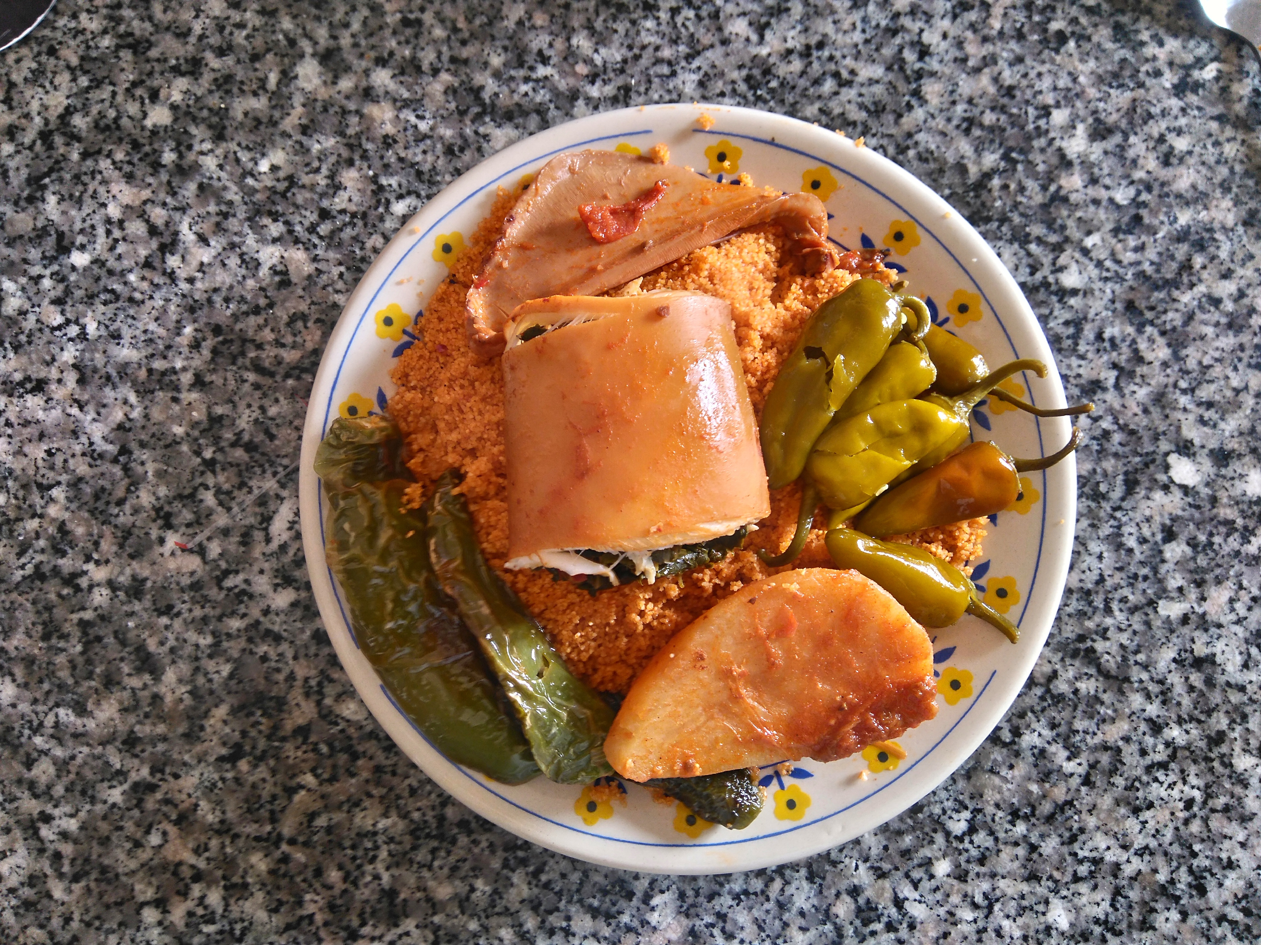 Plat de couscous aux légumes et aux calamars farcis, préparé dans la ville de Sayada, Tunisie